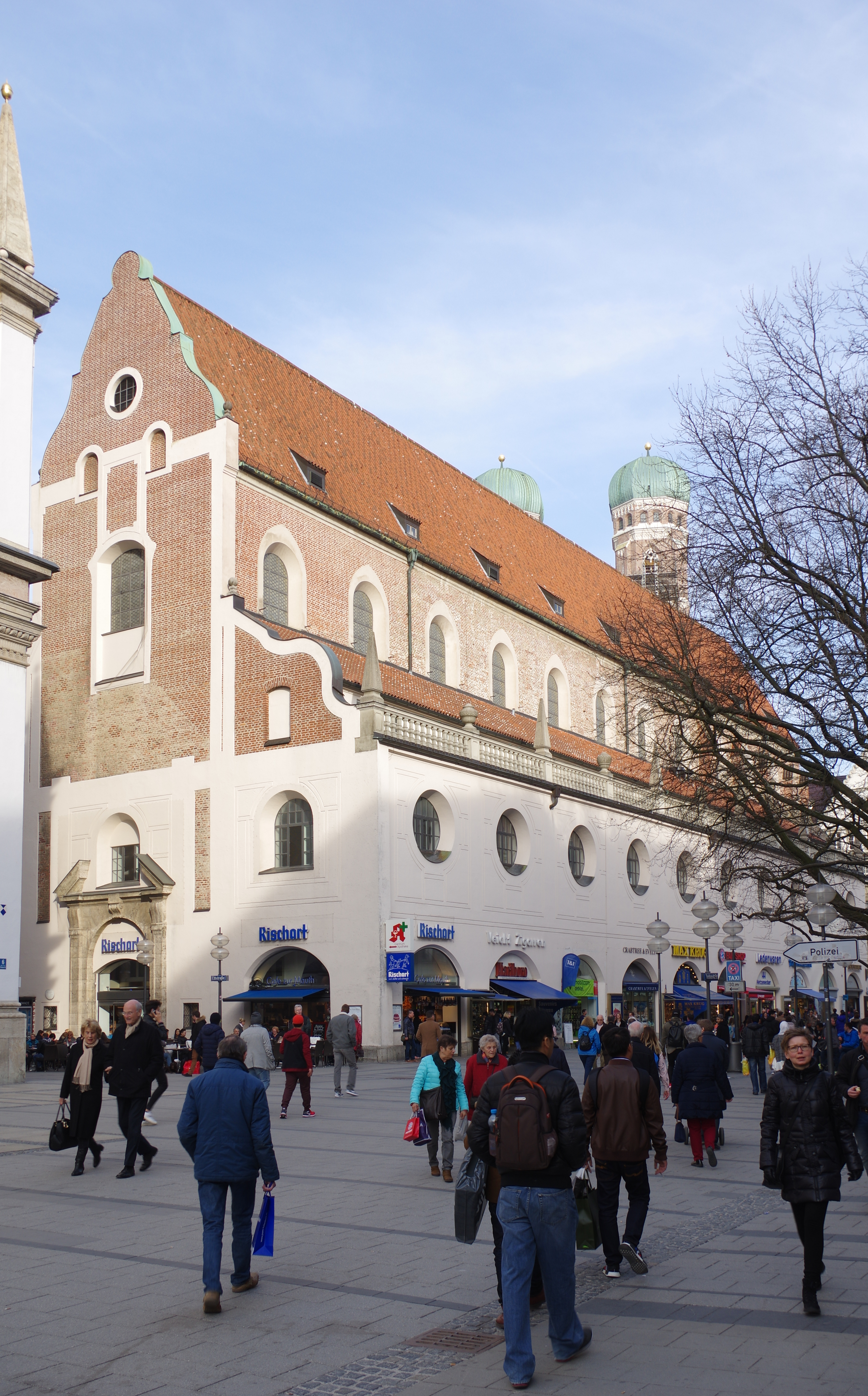 München, Neuhauser Straße 2, Augustinerkirche; Akten-Nr.D-1-62-000-4719